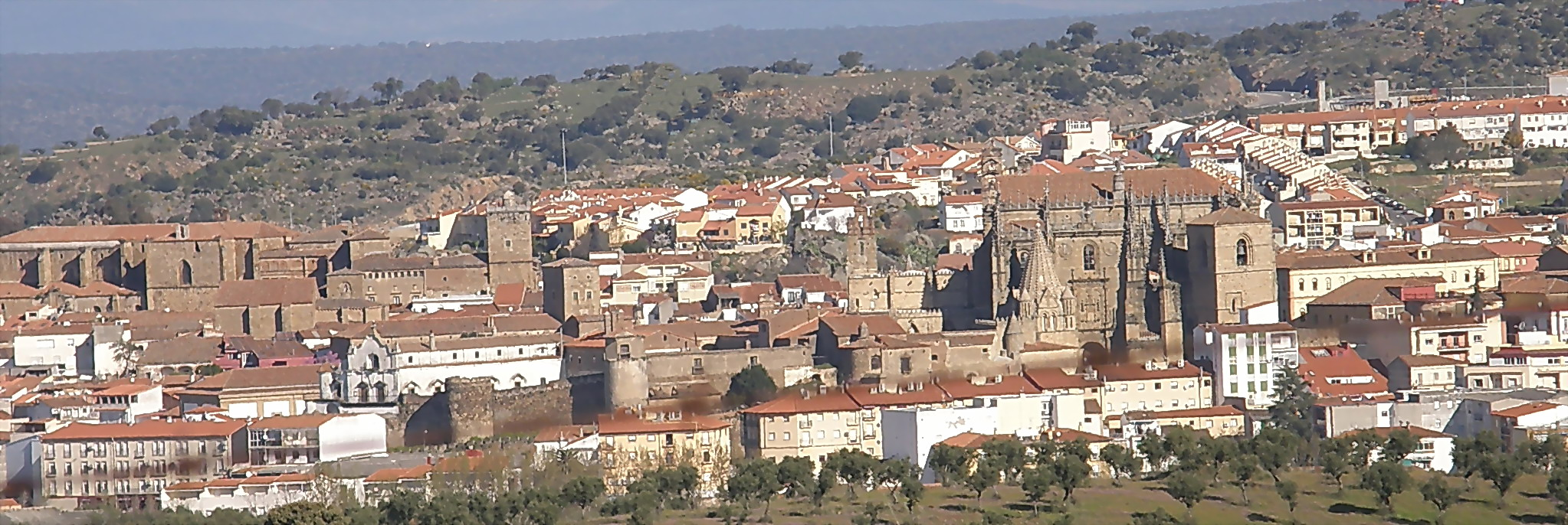 Ciudad del Norte de Extramadura. Cuenta con 42.000 habitantes. Es centro de servicios y de industria. Fundada por Alfonso VIII de Castilla en 1186 se sitúa en un maravilloso espacio a la rivera del Rio Jerte. En sus cercanías se sitúan las comarcas Placentinas del Valle del Ambroz, Valle del jerte, La Vera de Plasencia, la Sierra de Gata y la ciudad hermana de Coria. Al igual que el Parque Nacional de Monfragüe